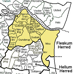 Fleskum Herred, Aalborg Amt, Denmark Source: Map by Svend-Erik Christiansen